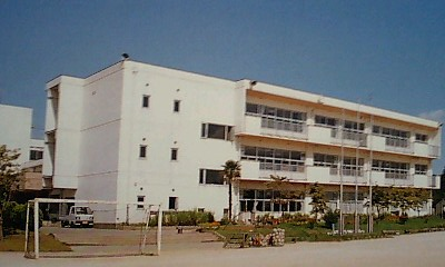 布佐南小学校校庭奥から校舎全景を撮影